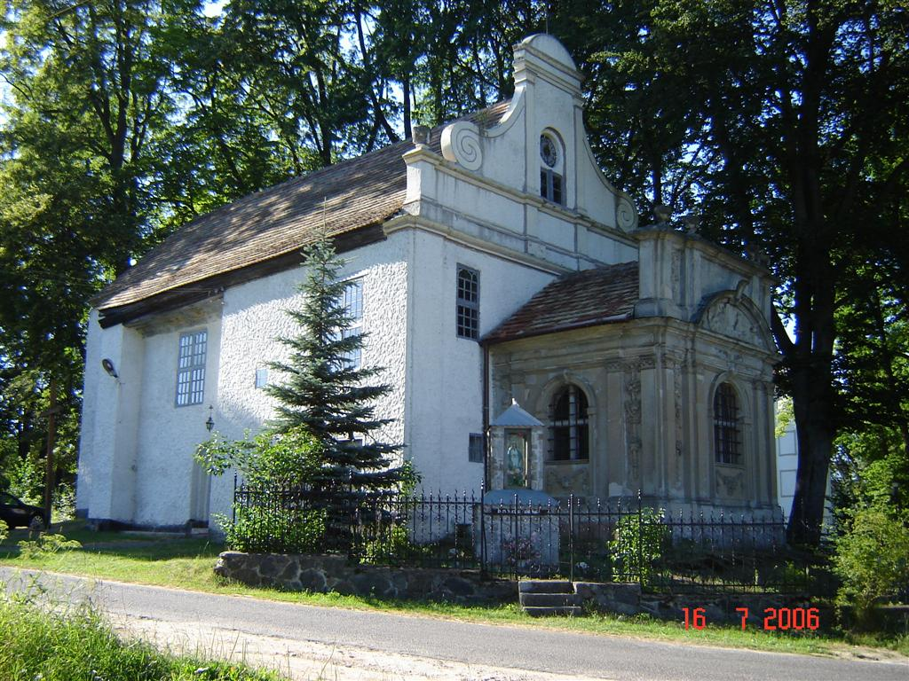 Kościół w Krągu